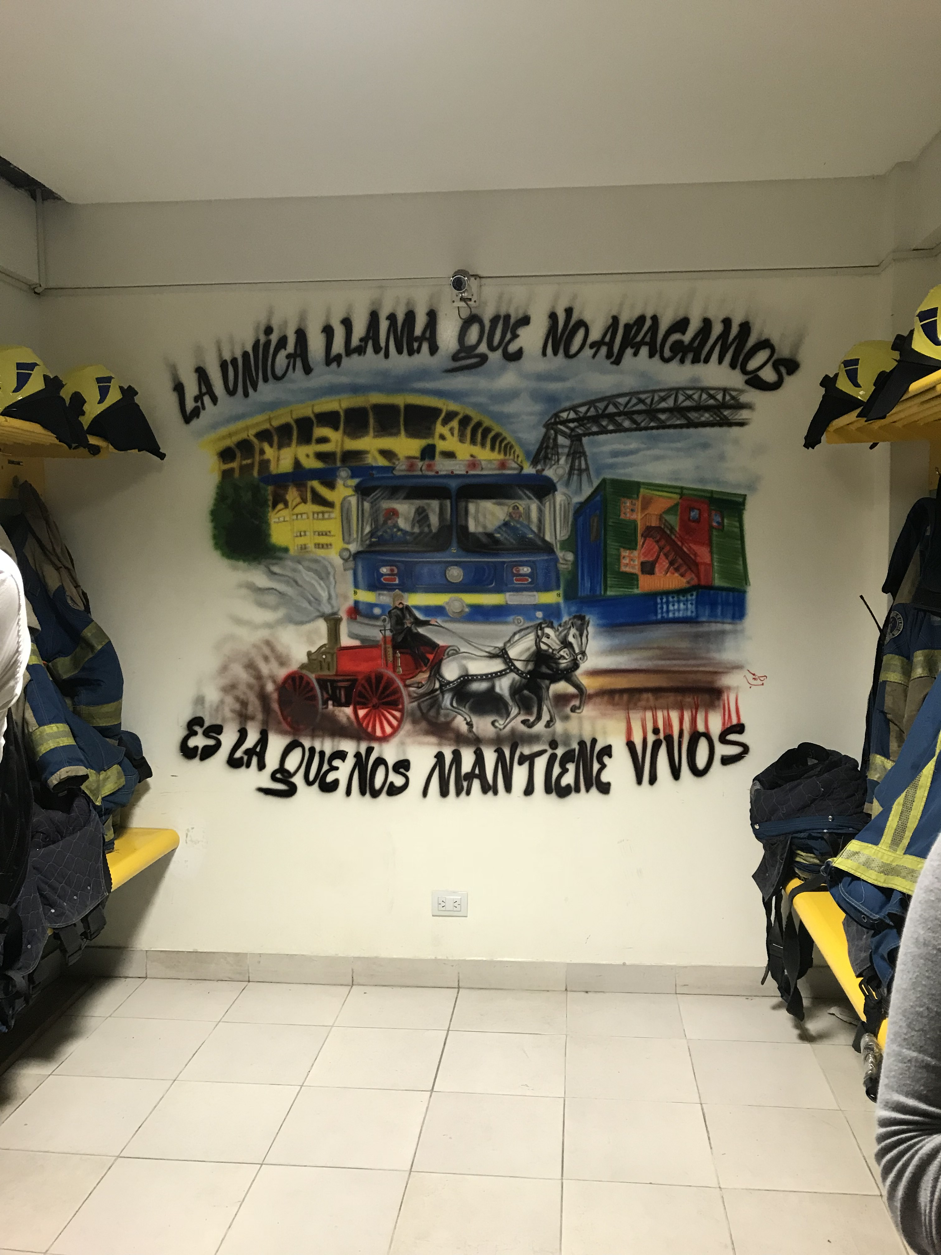 Mural en zona de vestuarios para emergencias